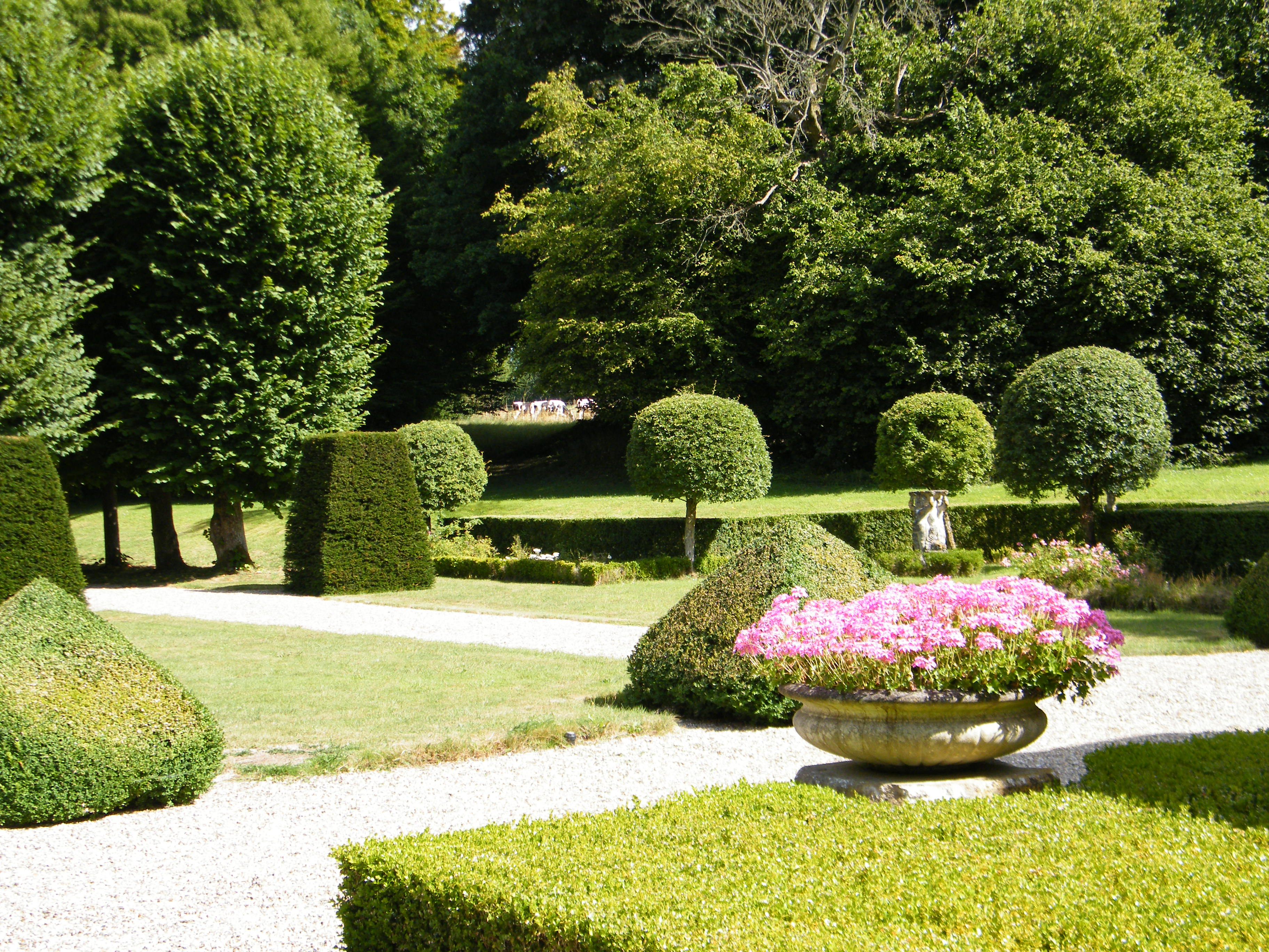 Abbeville, Somme, Fr, Château de Bagatelle, jardin à la française, derrière le château, perspective sur les herbages.